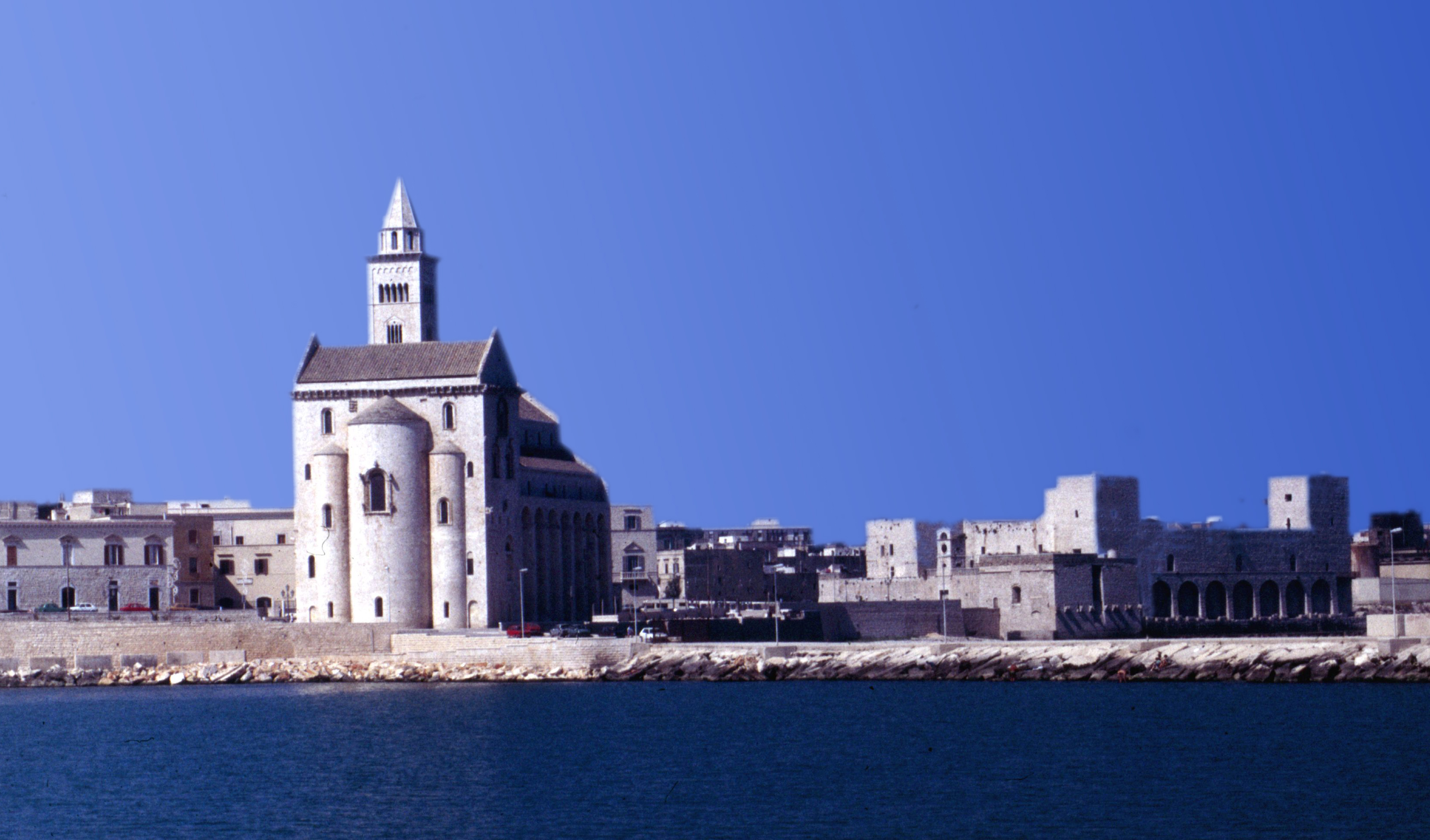 Dom von Trani in Apulien